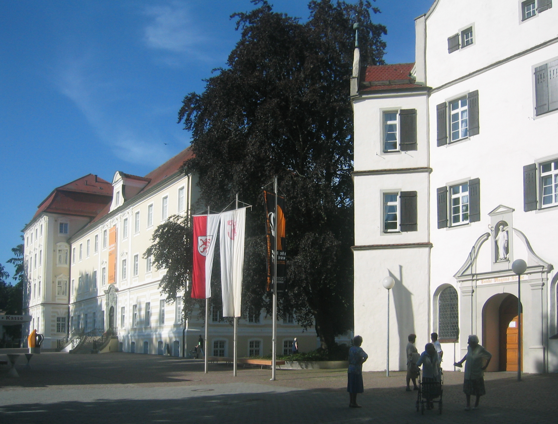 Bad Schussenried, Kloster Schussenried, Neues Konventsgebäude (Neues Kloster) und Klosterkirche St. Magnus (rechts)